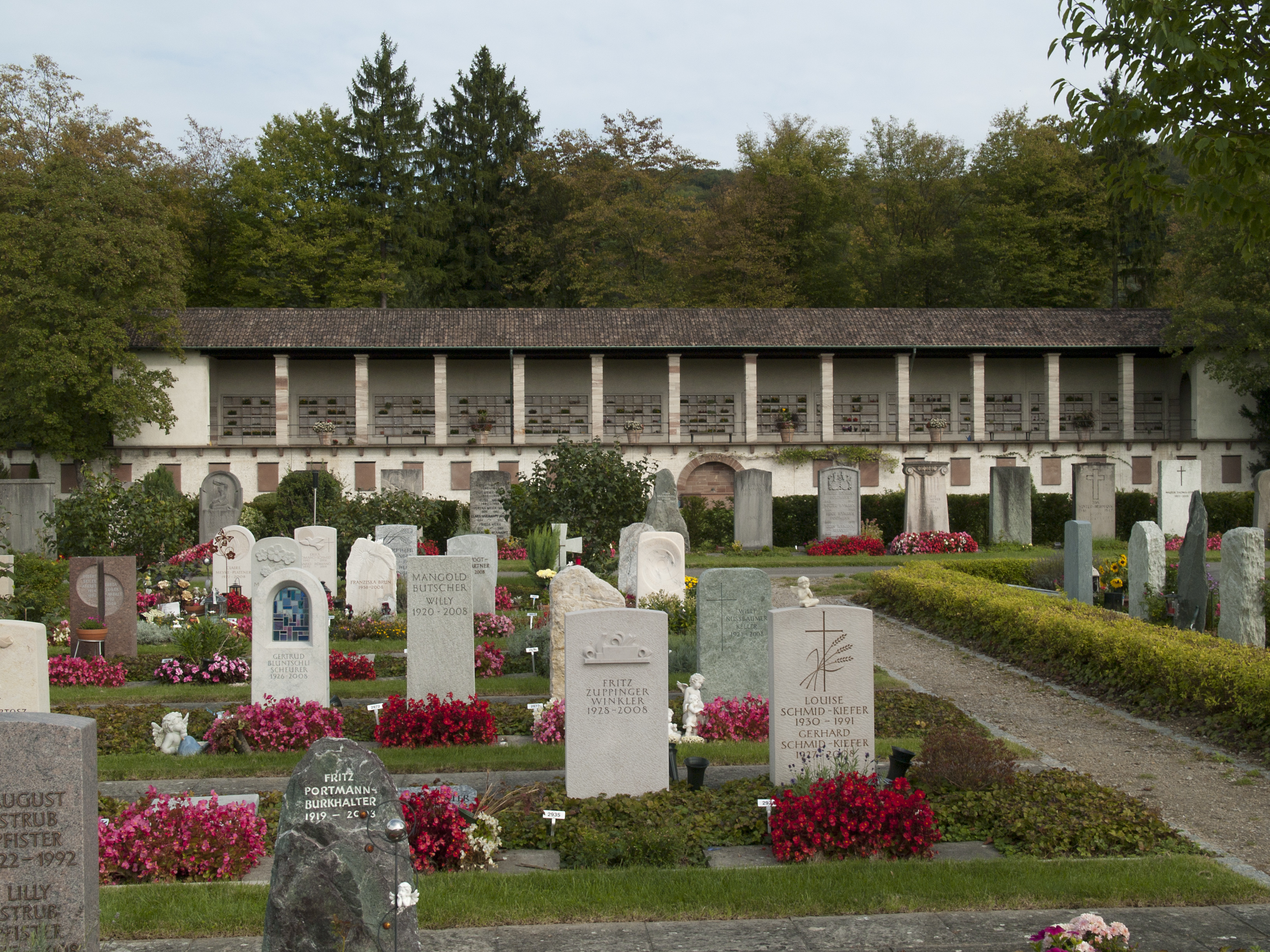 Riehen (Basel-Stadt) Friedhof am Hörnli, Gräber und Columbarium